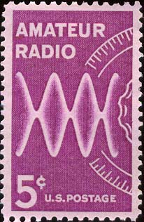 US postage stamp, 1964.